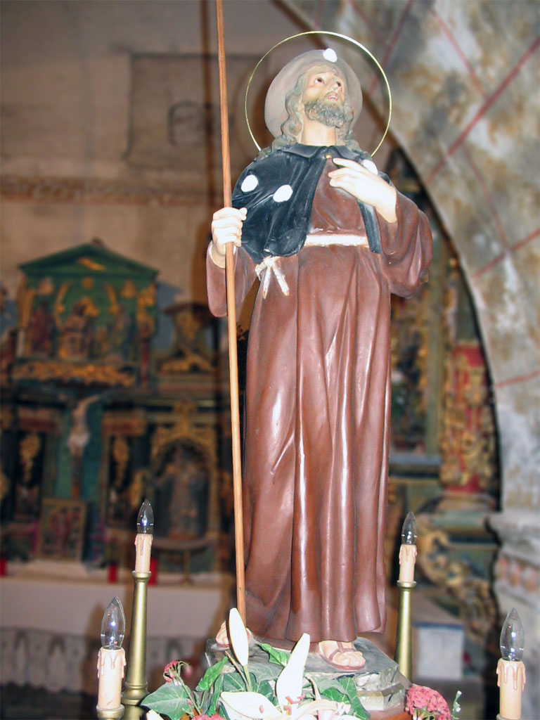 Imagen de Santiago